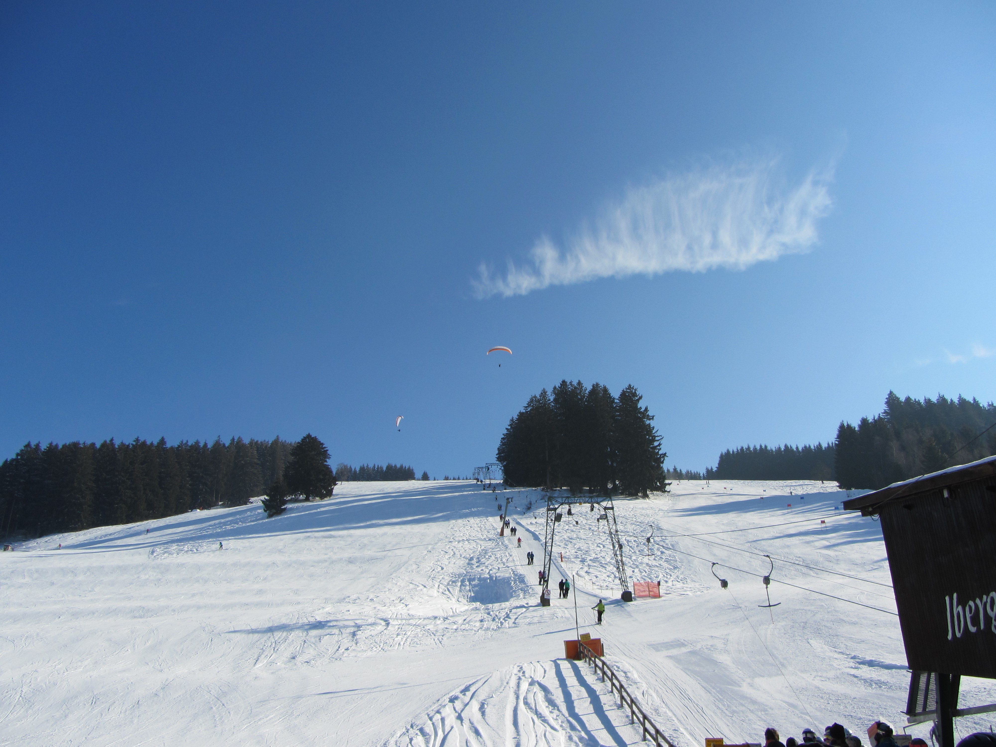 Skilift I-Berg